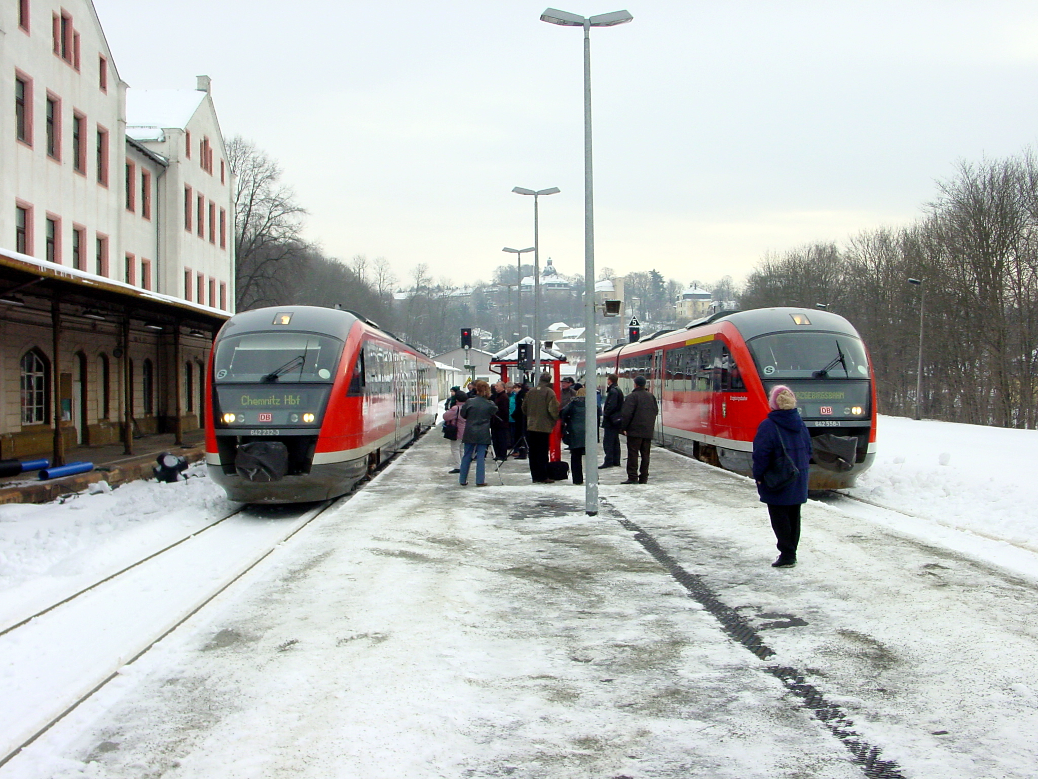 DB 642 232-3 und 642 558-1 in Annaberg-Buchholz, Unterer Bahnhof